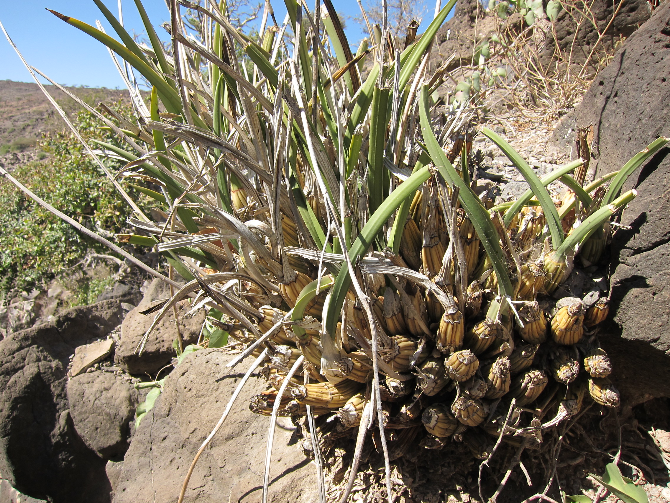 Eulophia petersii (Rchb. f.) Rchb. f., Monts Goda, Djibouti